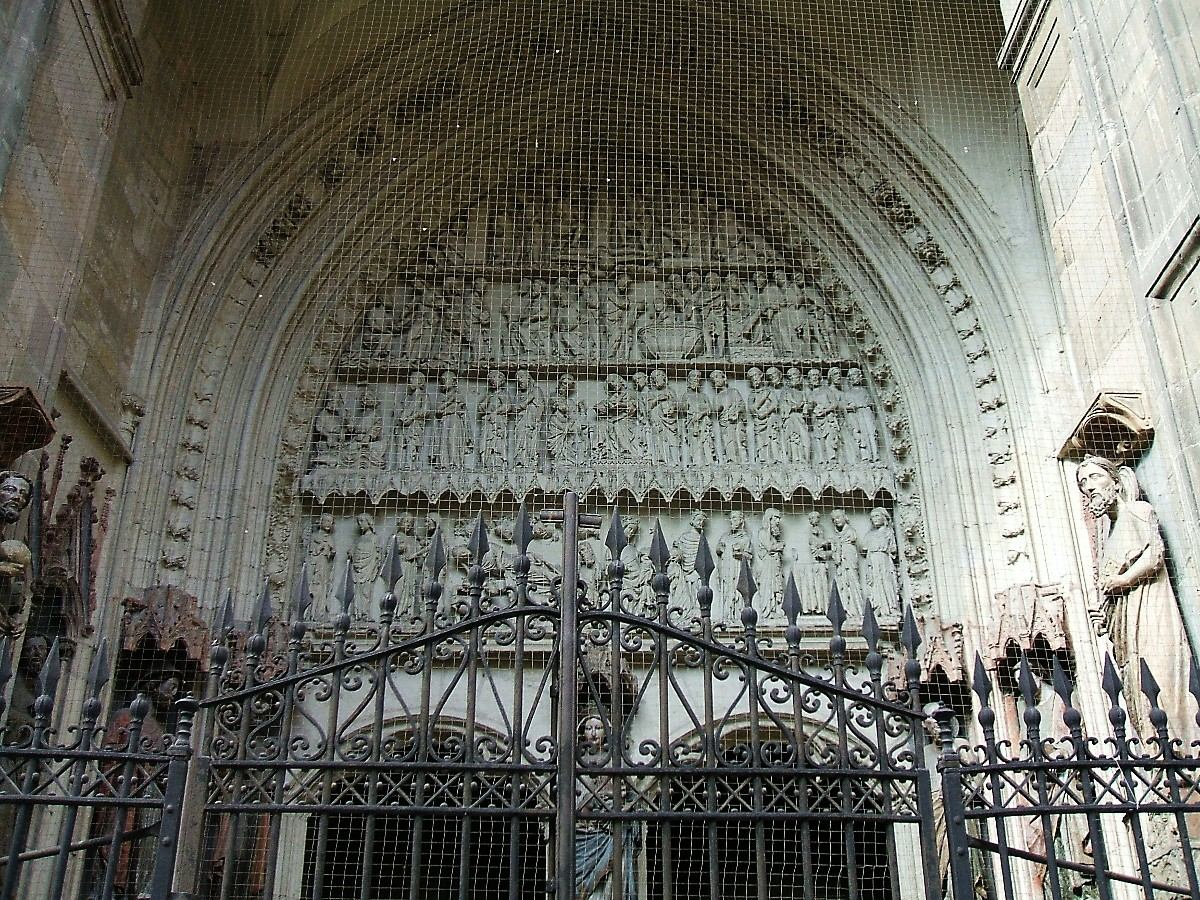 Pórtico Viejo de la iglesia de San Pedro Apóstol, Vitoria-Gasteiz